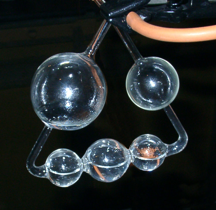 Fünfkugelapparat, Liebig